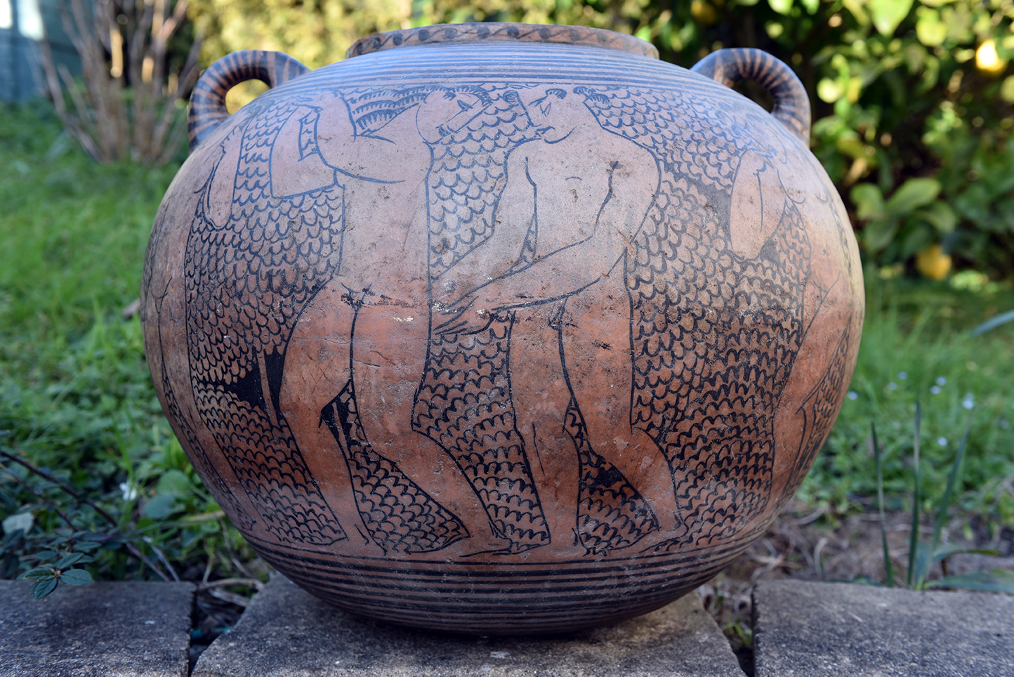 Pièce unique Poterie de Ciboure